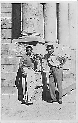 Annibale Ninchi e il Fratello Carlo insieme